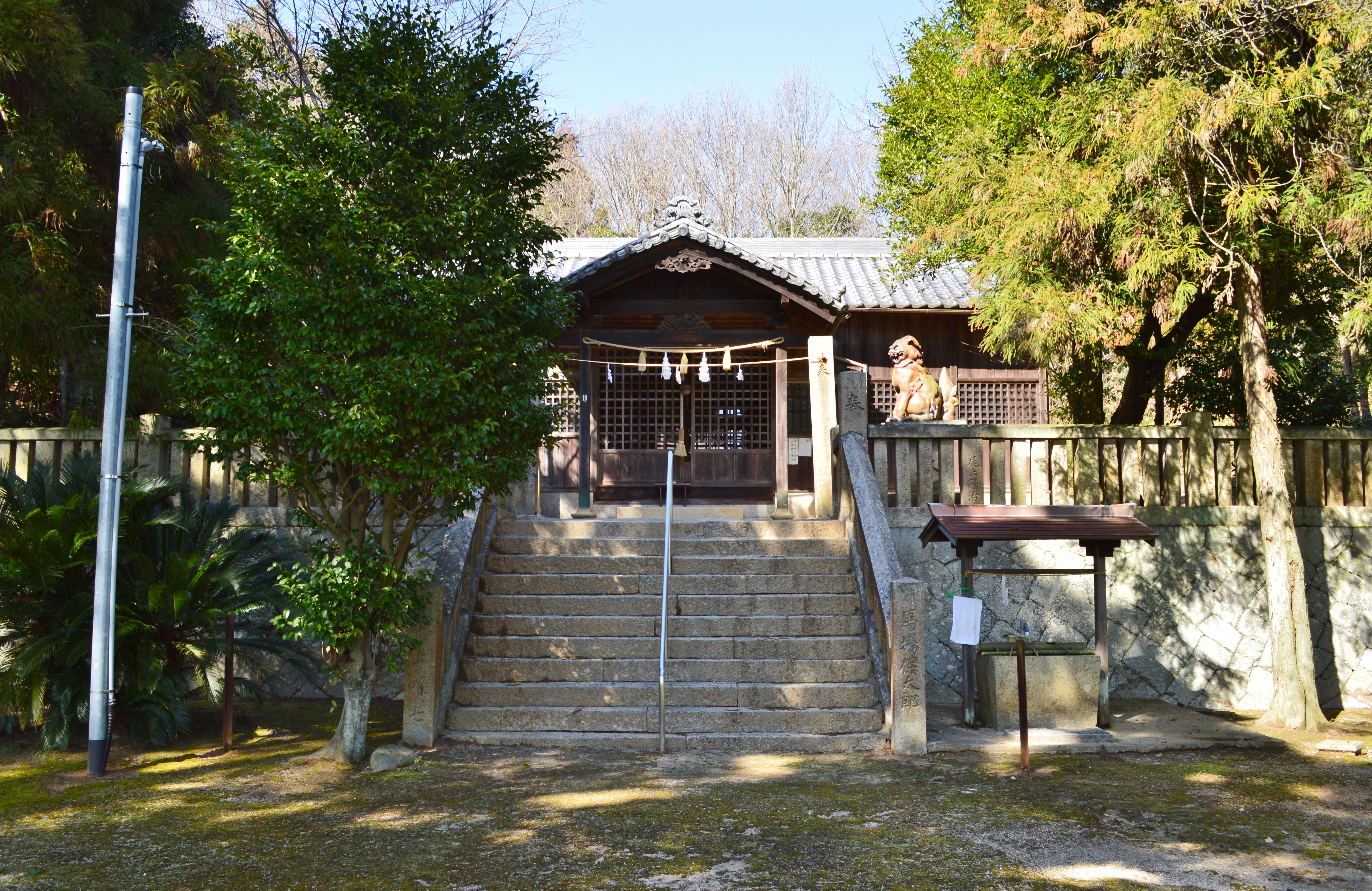 鹿忍神社 拝殿